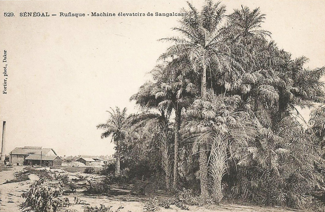 François-Edmond Fortier, Rufisque. Machine élévatoire de Sangalcam. Afrique Occidentale. Sénégal